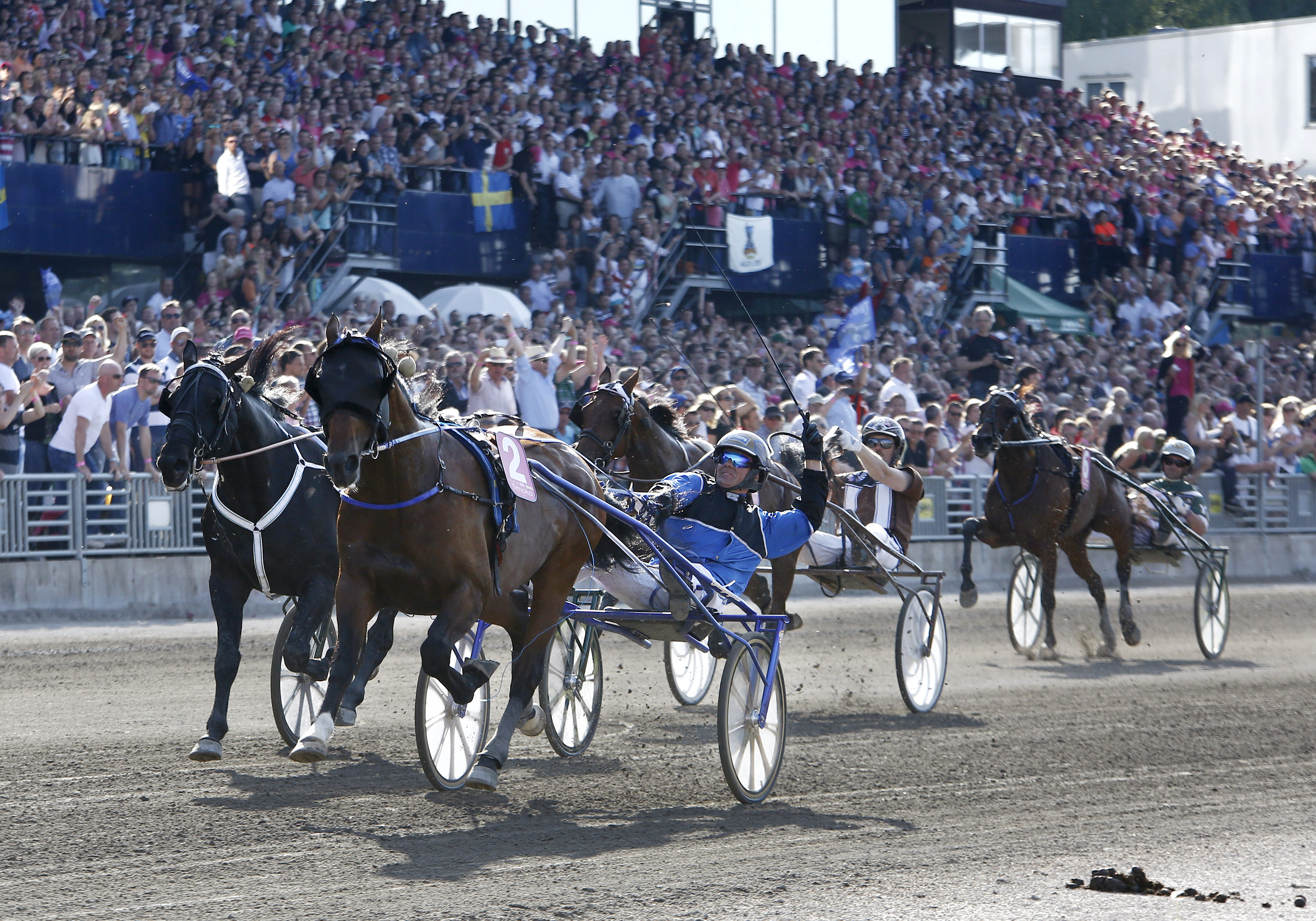 Kusken Björn Goop vinner Elitloppet 2014 på Solvalla med franske travaren Timoko.